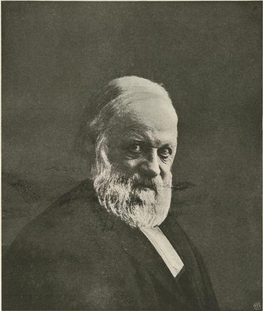 Norsk (bokmål): Professor Ludvig Ludvigsen Daae (1834–1910).